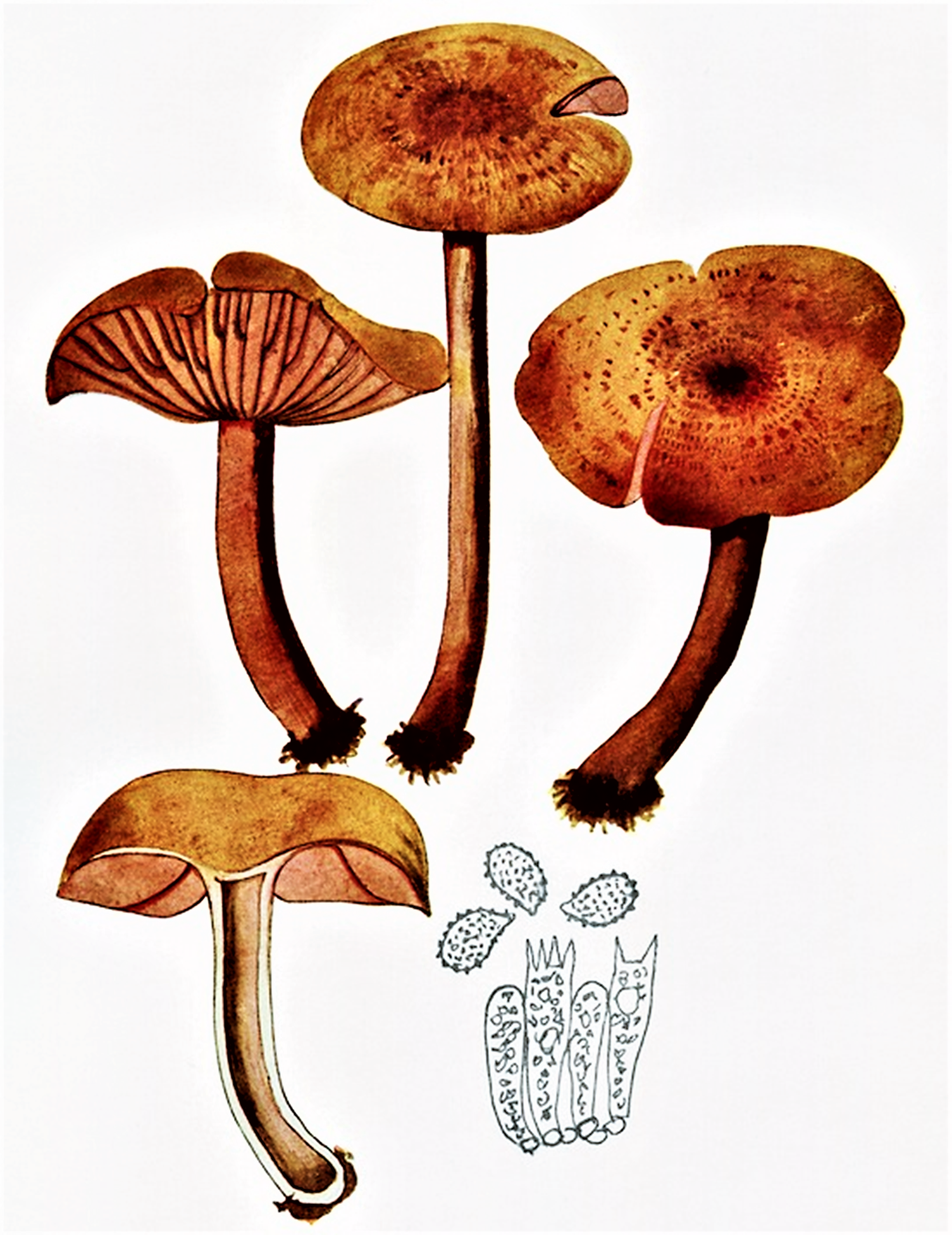 Giacomo Bresadola: Clitocybe laccata var. proxima (Scop., 1772) Boud. (1881), heute Laccaria proxima (Boud.) Pat. (1887)